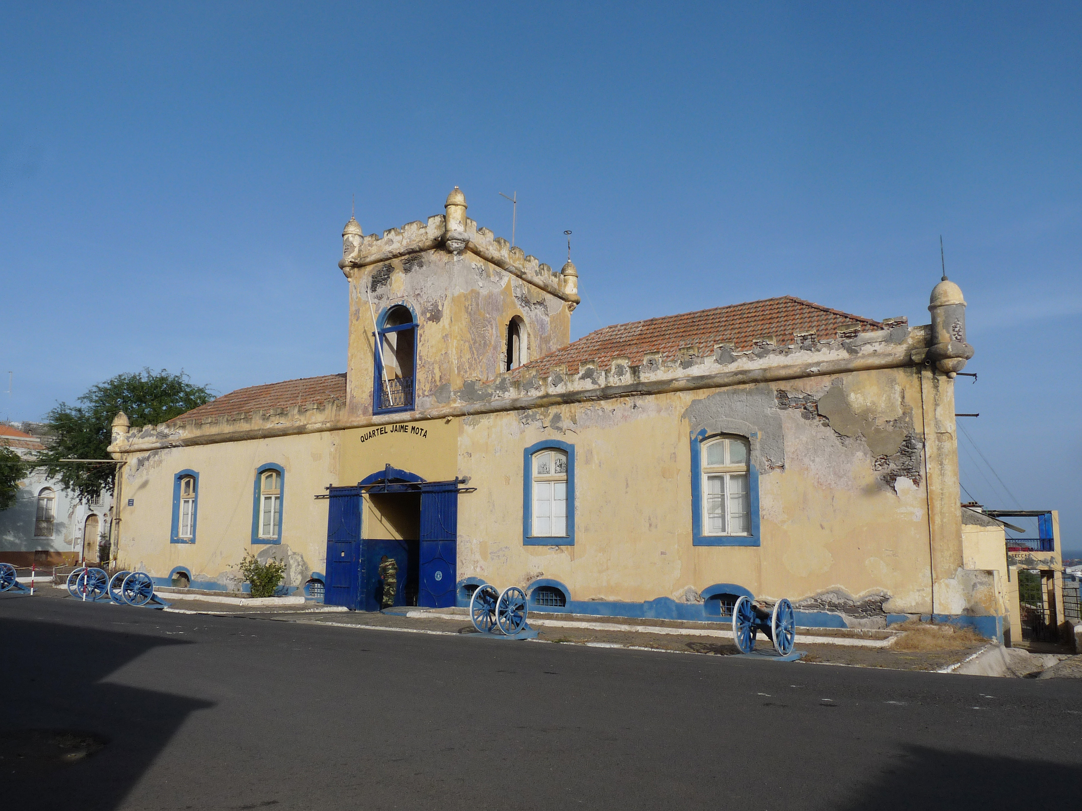 Praia (Cap-Vert) : Quartel Jaime Mota